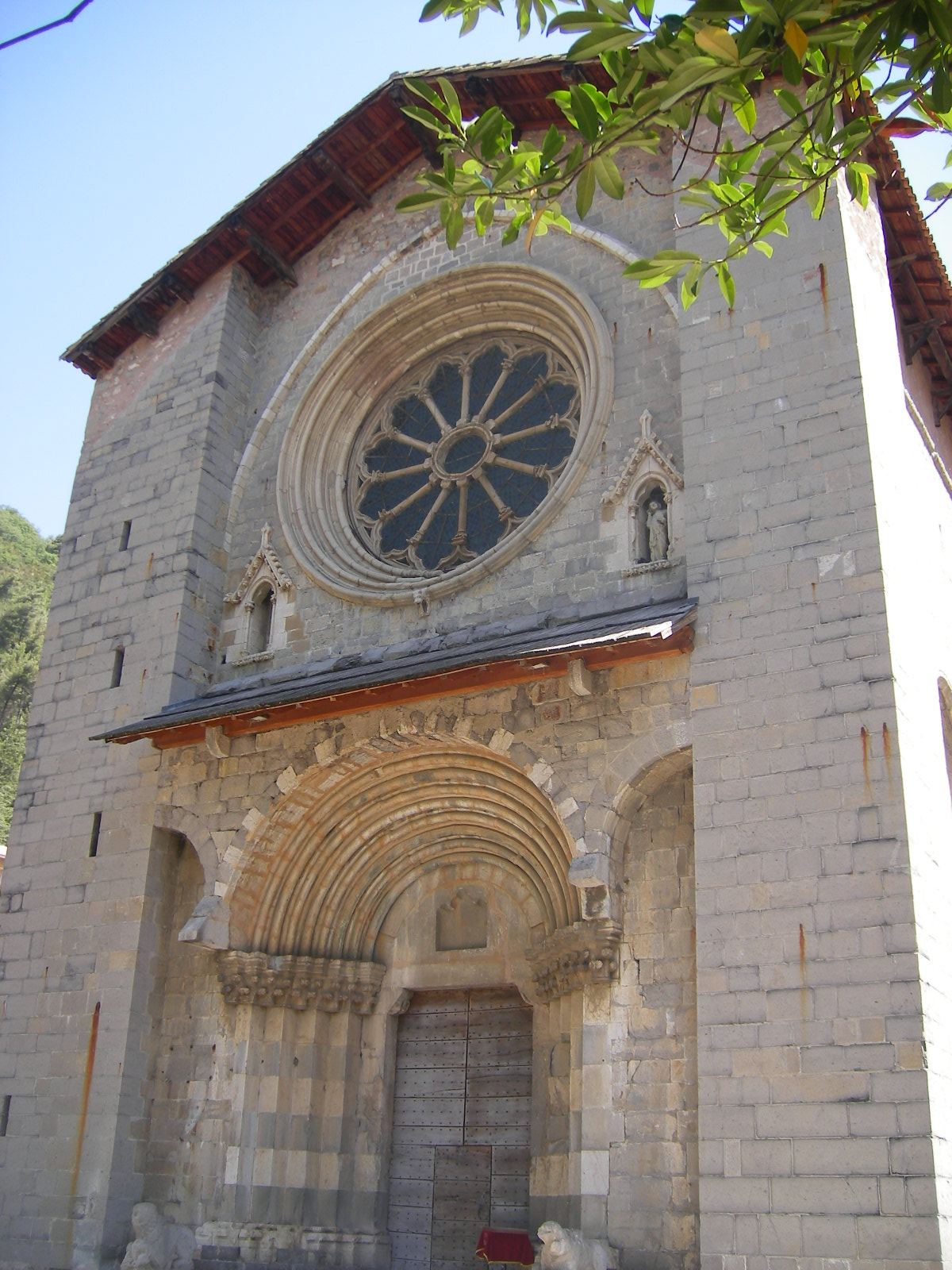 Digne-les-Bains - ancient cathedral Notre-Dame-du-Bourg